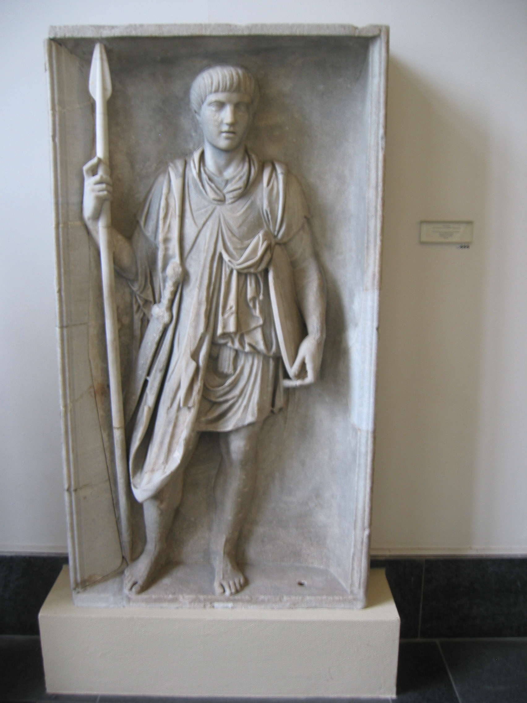 Relief mit der Darstellung eines römischen Legionärs, Römisch, Ende des 1. Jh., um 1800 in Pozzuoli gefunden, für die Antikensammlung Berlin 1830 in Rom erworben, weißer bis graubläulicher Marmor, 159 cm hoch und 86 cm breit, Sk 887